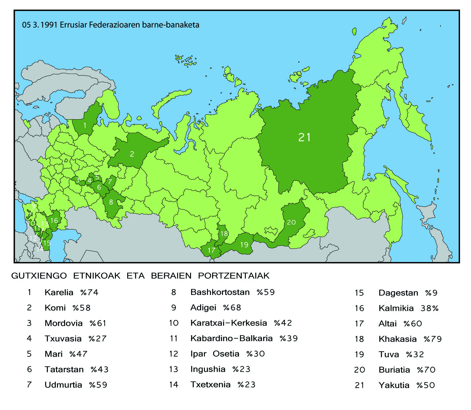 1991 Errusiar Federazioaren barne-banaketa, UEUren liburutik hartua.